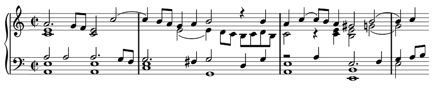 Premières mesures de la Pavana de Thomas Morley, extrait du Fitzwilliams Virginal Book n° 153.